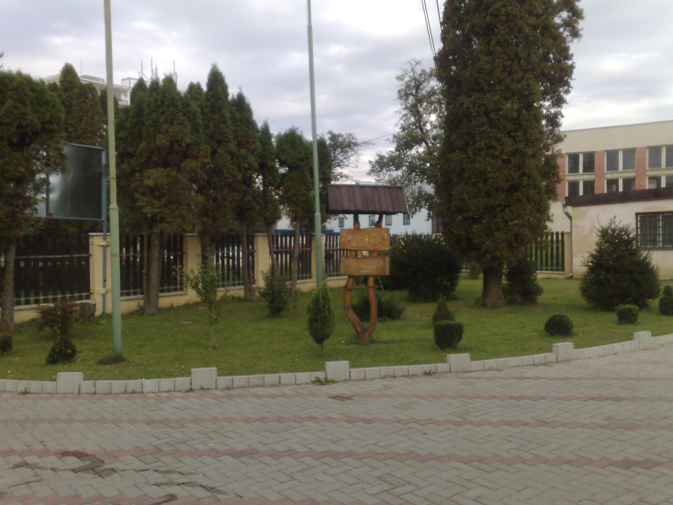 ZŠ MLYNSKÁ, Stropkov